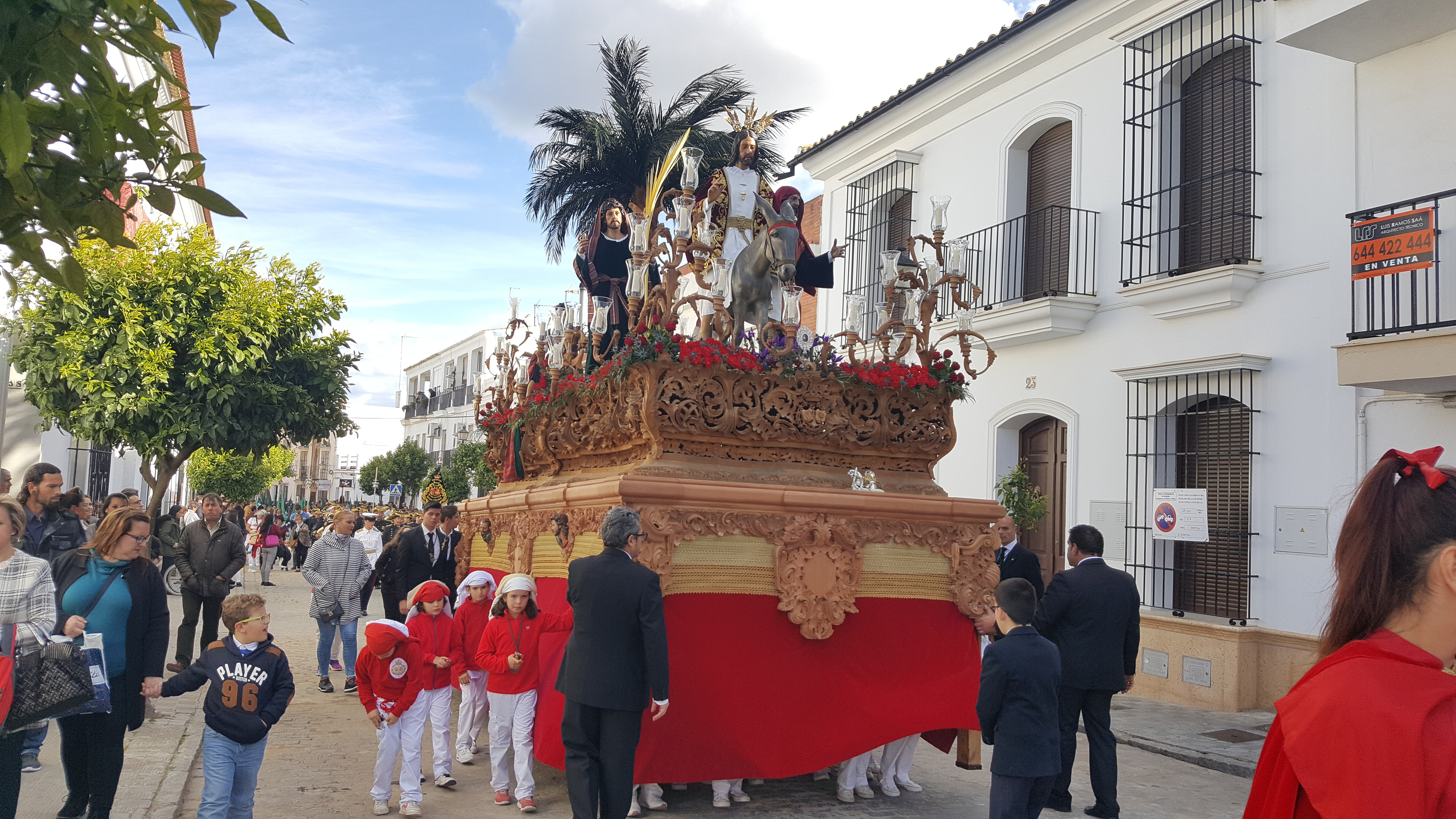 Hermandad de la Borriquita. Desfile procesional del Domingo de Ramos. Vista del desfile por el casco urbano de Moguer.